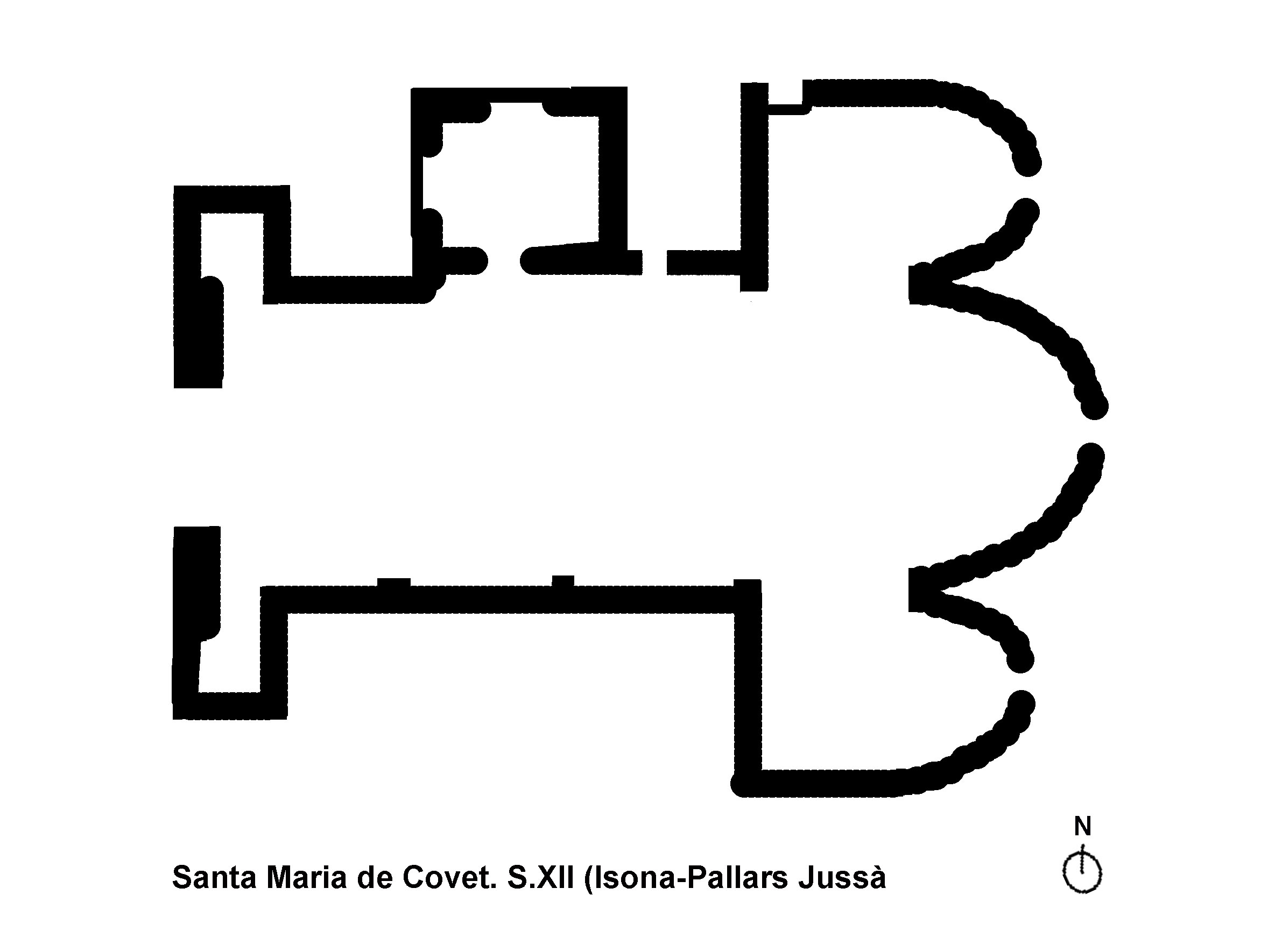 Planta / layout de Santa Maria de Covet (Isona, Pallars Jussà, Catalonia, Spain) Romànic / Románico / Romanesque s.XII